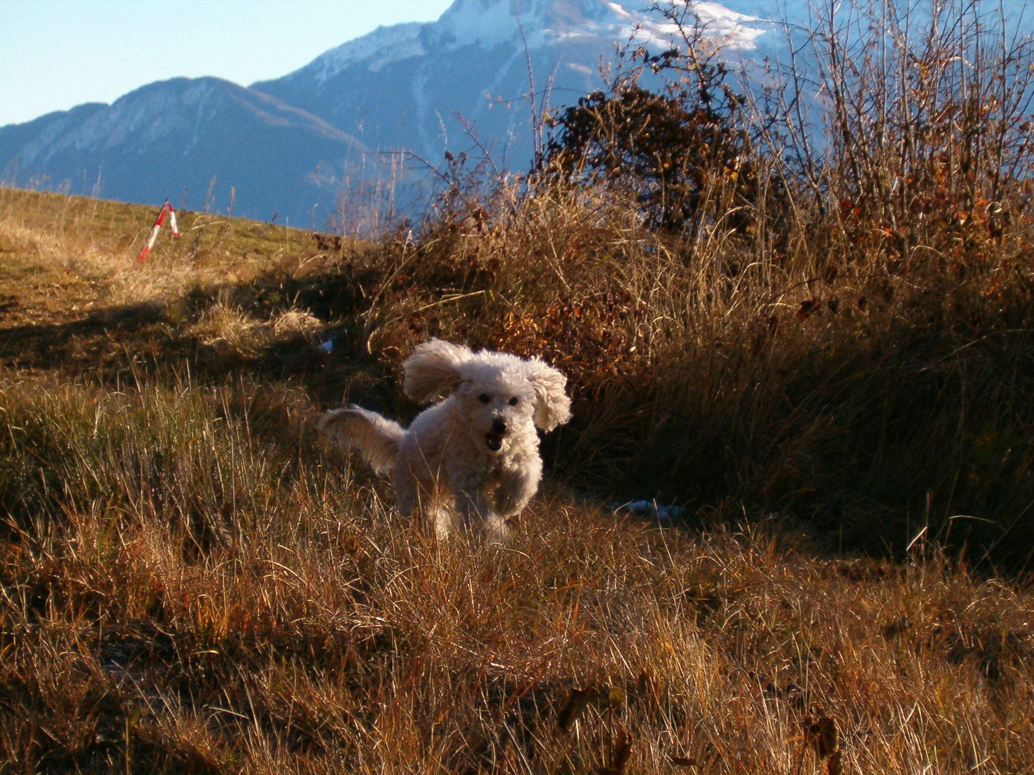 Caniche actif